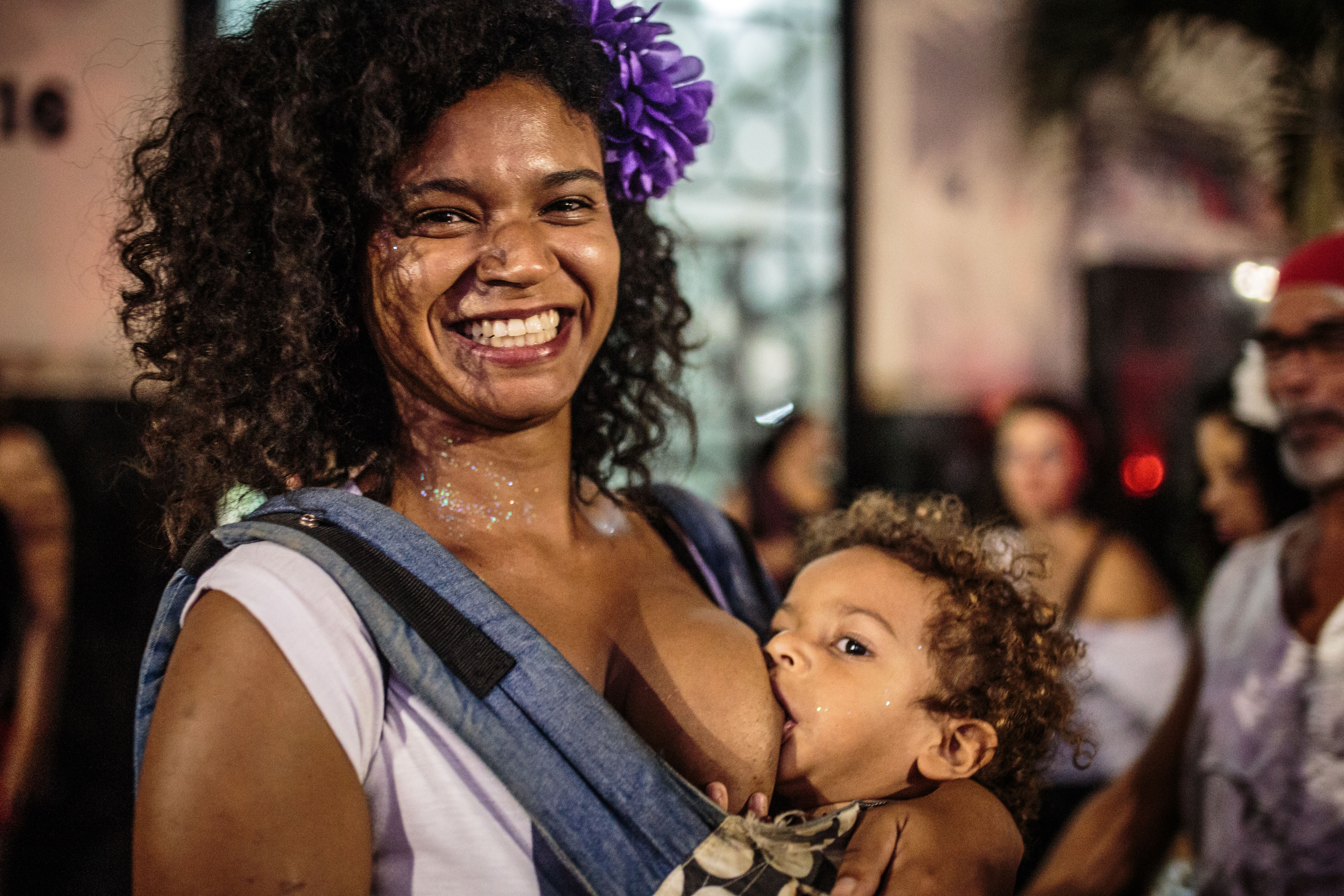 Tem marchinha, samba enredo e, claro, muito FORA TEMER. Mais um CarnavATO acontece no centro do Rio de Janeiro, porque carnaval também é política e espaço para discussão. O Bloco Fora Temer que reuniu milhares de foliões insatisfeitos com o governo golpista seguiu da praça da Cinelandia aos Arcos da Lapa. Fotos: Francisco Proner Ramos/ Mídia Ninja